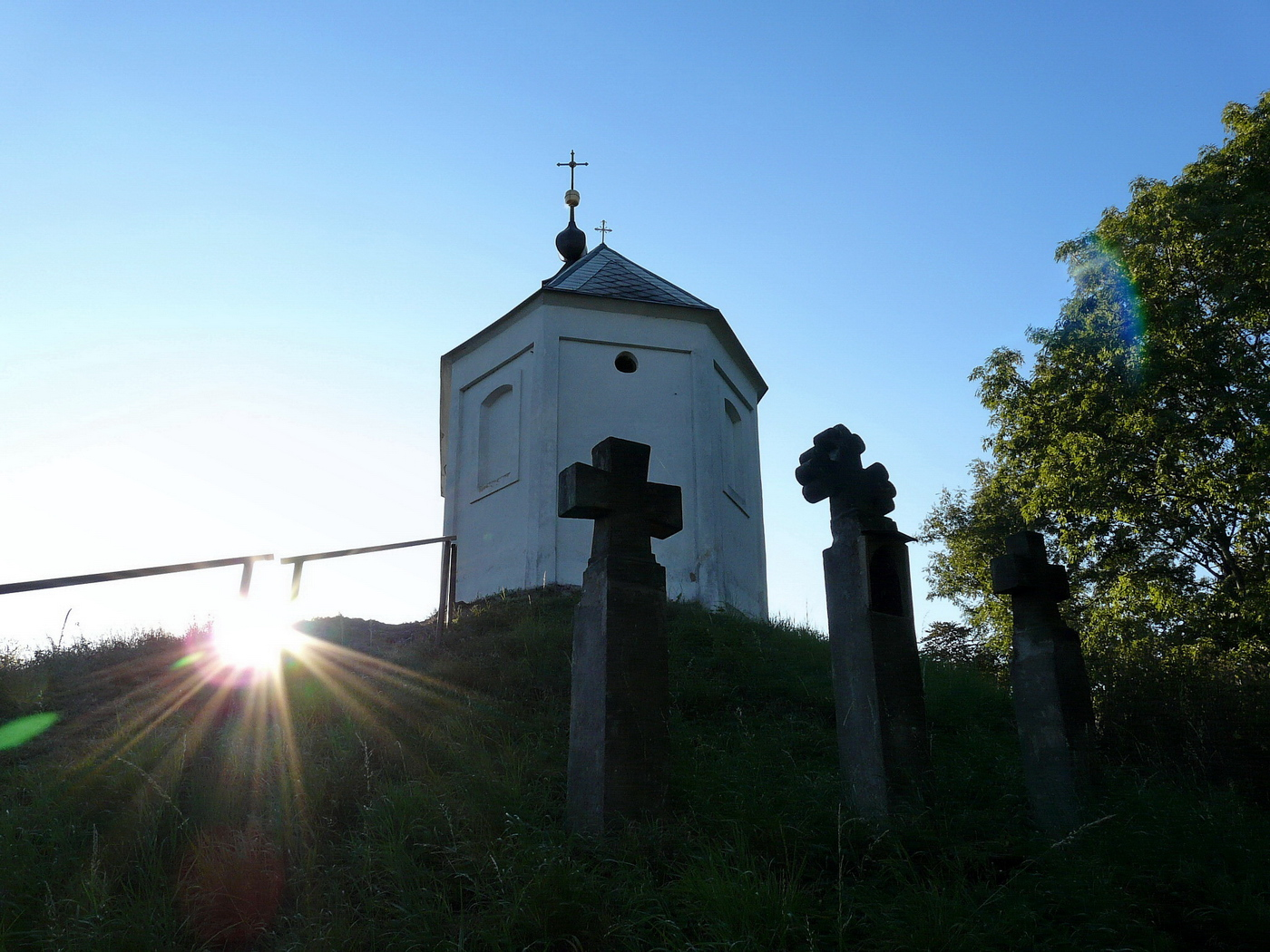 Kaple sv. Anny na Vyskři